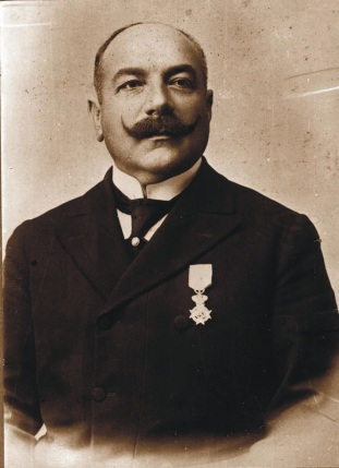 Портрет на гръцкия архитект Ксенофон Пеонидис.